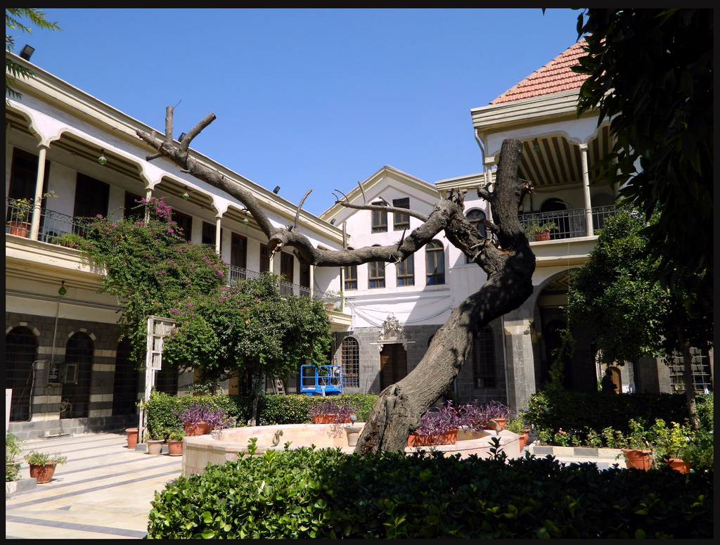 مكتب عنبر